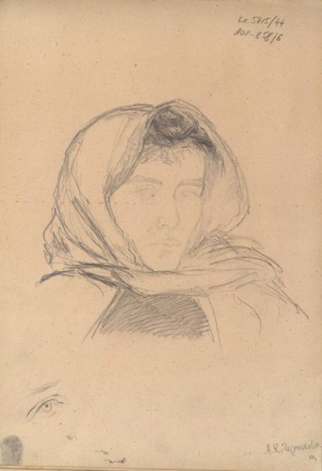 Набросок портрета Чертковой А. К.. 1890-е Материал, техника: бумага, карандаш Размер: 33 х 23 Место создания: г. Кисловодск (?) Номер в Госкаталоге: 18732969 Номер по ГИК (КП): ГМТ КП-5715/44 Инвентарный номер: АИГ-858/6 (Федеральное государственное бюджетное учреждение культуры "Государственный музей Л. Н. Толстого")